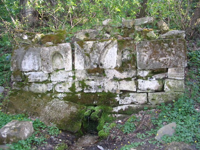 Milan Predrag Vasić. Crljenac